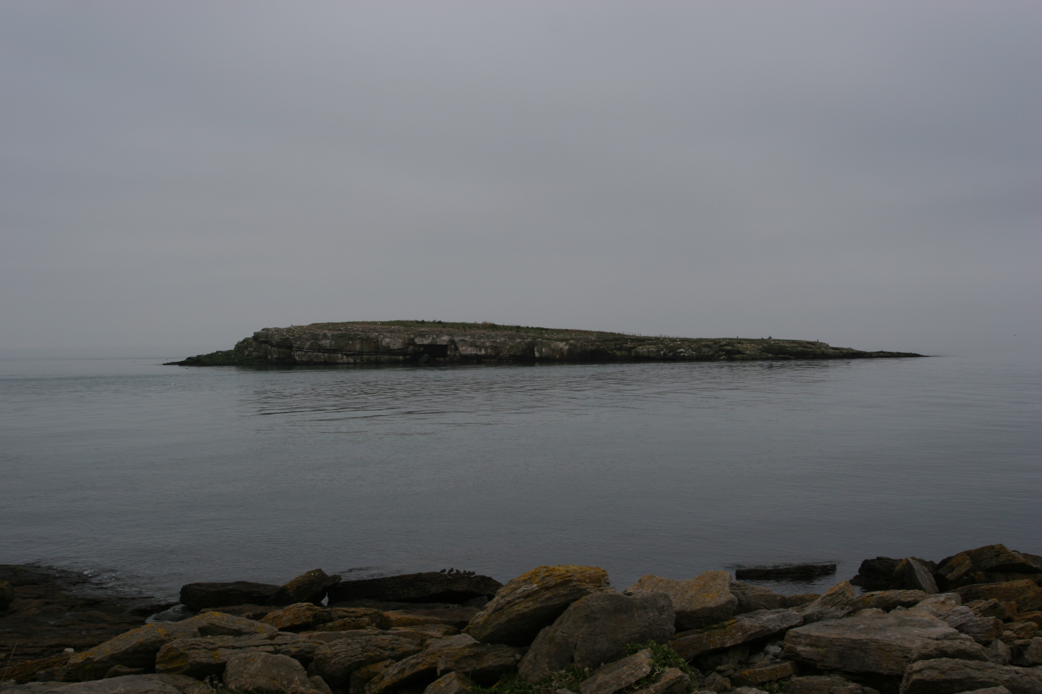 Ynys Moelfre Anglesey Rhion Pritchard